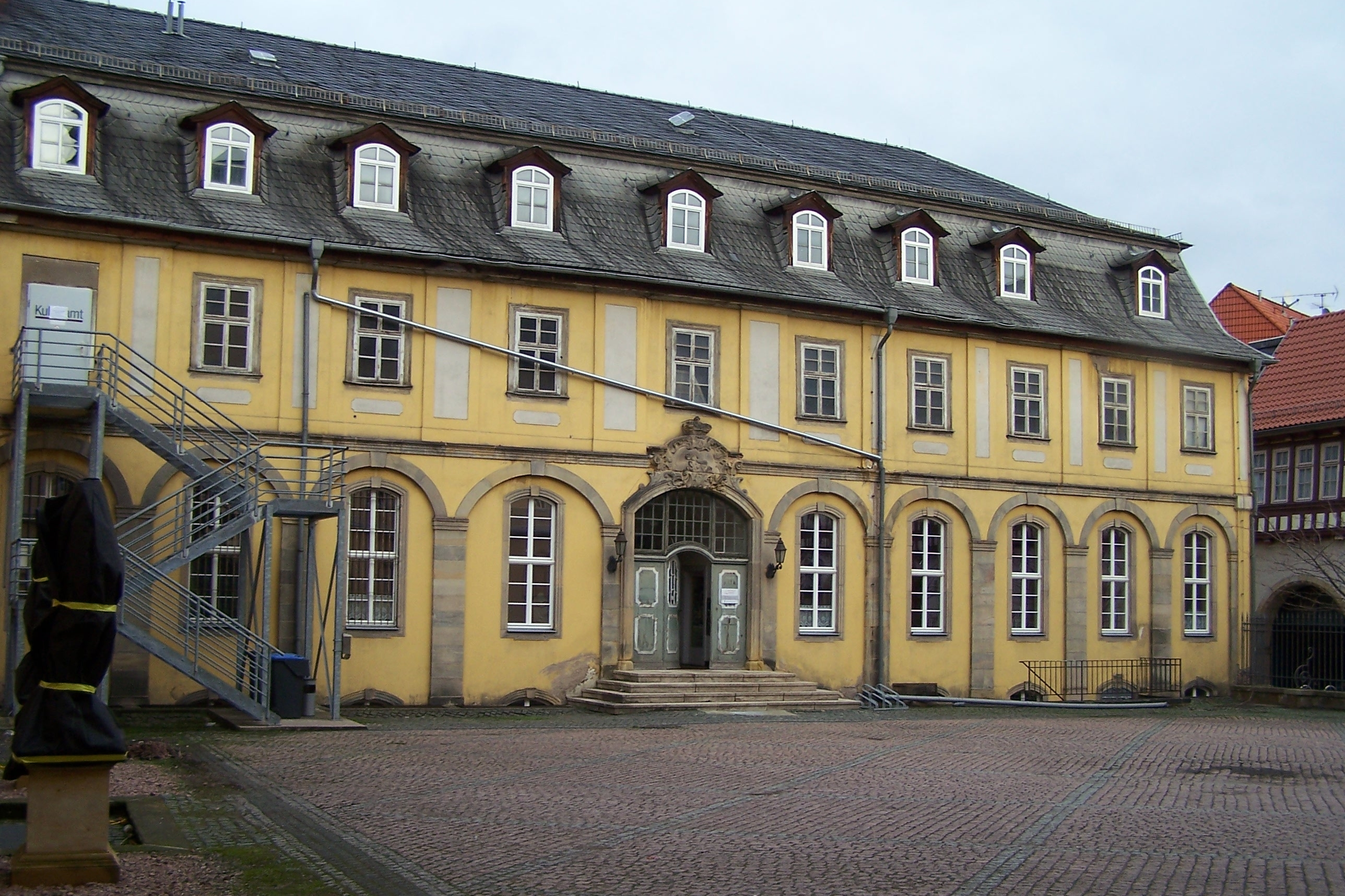 Die Hofansicht des Nordflügels. Dieser Teil der Schlossanlage ist noch unsaniert. Auch die Hof- und Dachentwässerung in diesem Bereich muß komplett erneuert werden.